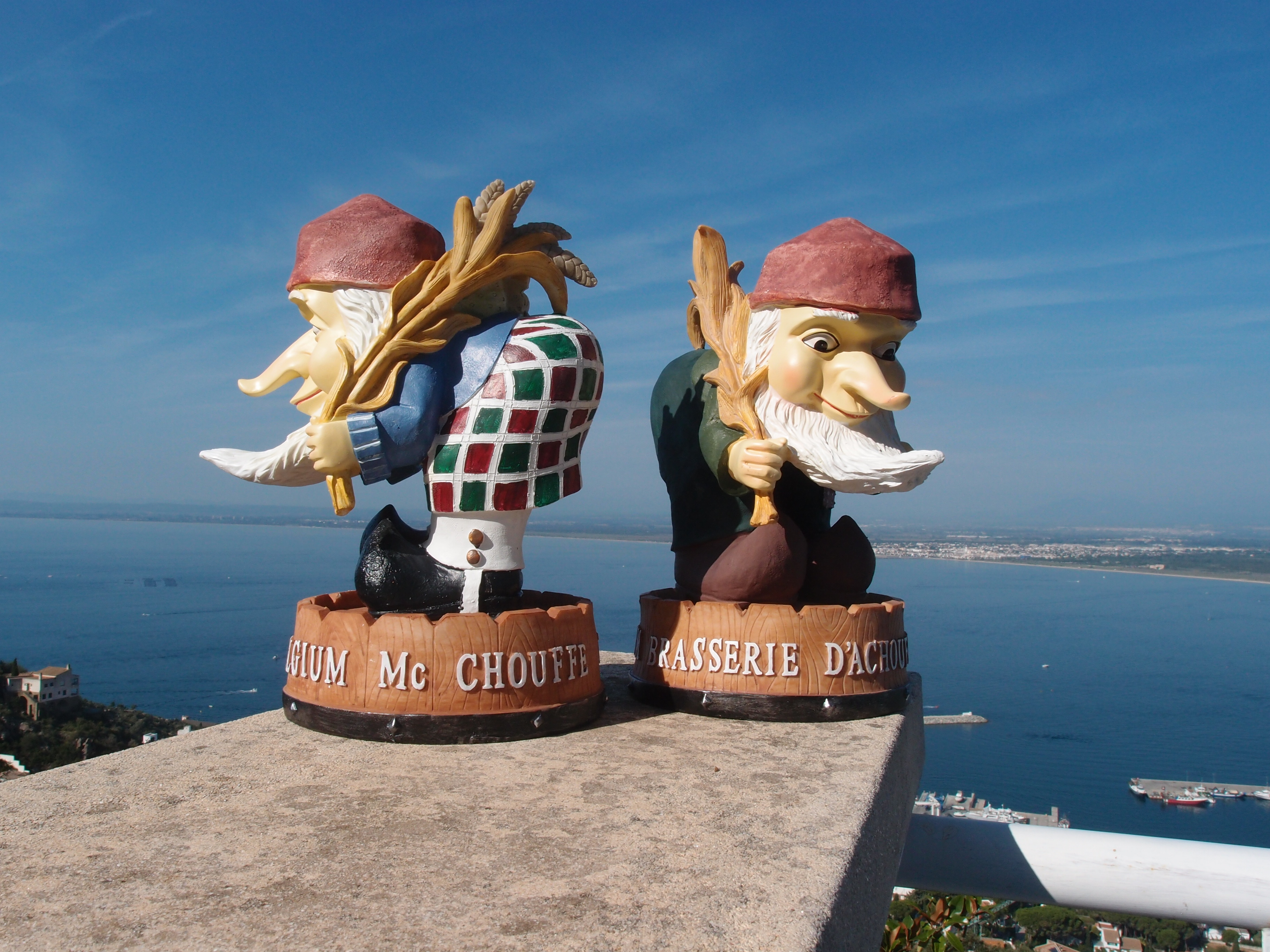 La Chouffe und Mc Chouffe Zwerge der belgischen Brauerei "Brasserie d'Achouffe" Datum: 06.09.2014 Urheber: M. Pfeiffer alias Gordito1869 Quelle: privates Fotoarchiv des Urhebers